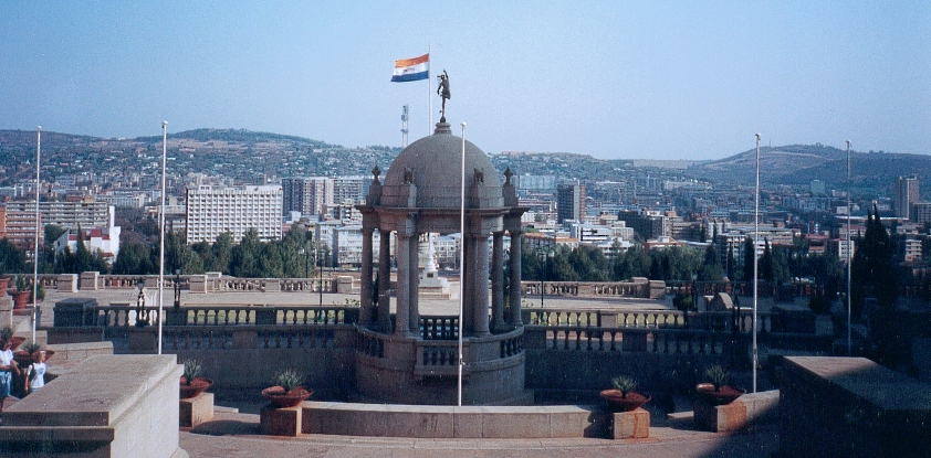 Sujet: Pretoria, Vue depuis les Unions Buildings Reproduction et utilisation non autorisée sans l'accord de l'auteur